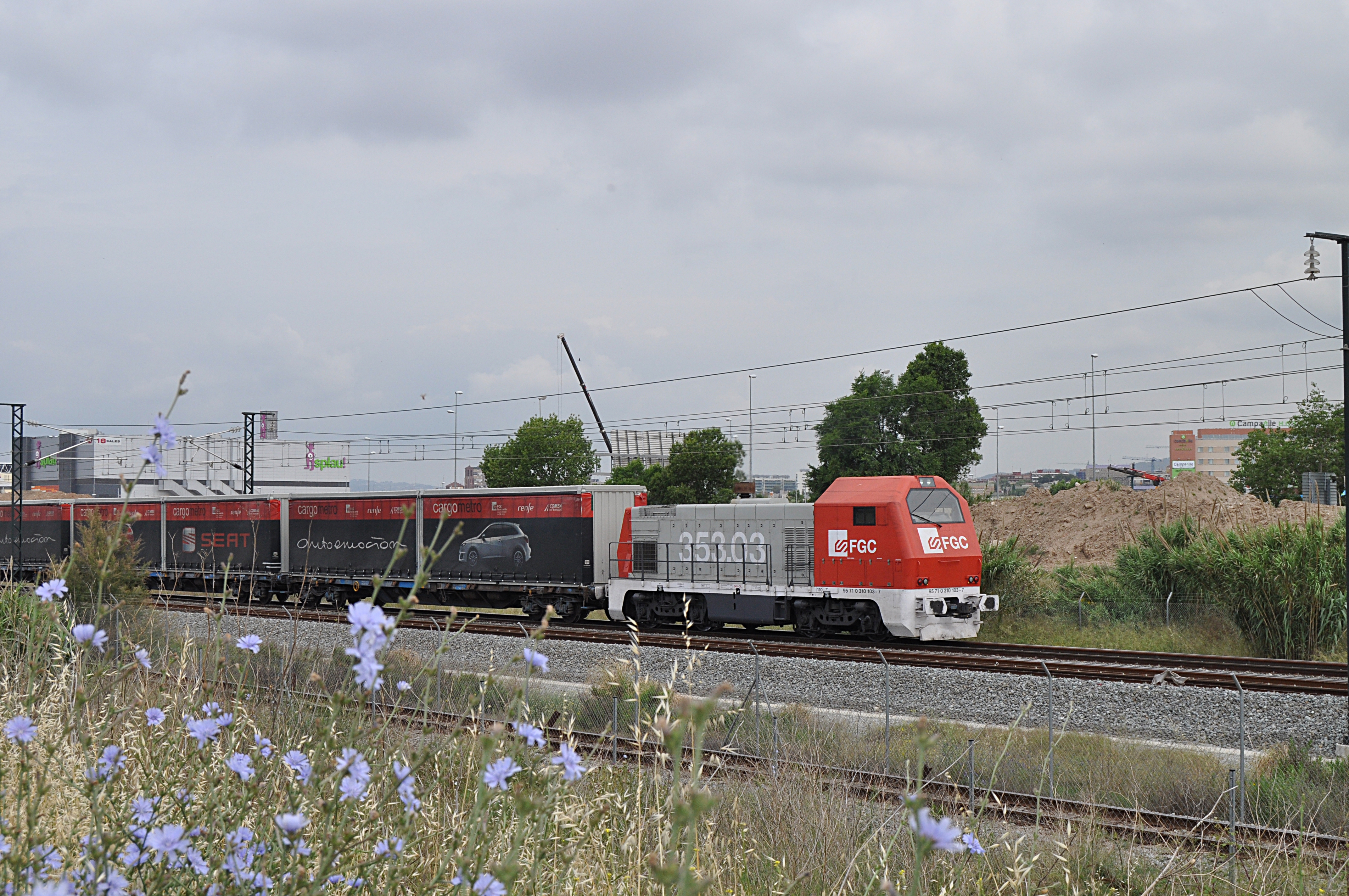 La llocomotora dièsel 353.03 de FGC (ex-Renfe serie 310.103) amb el Cargometro per el ramal de mercaderies de Can Tunis.